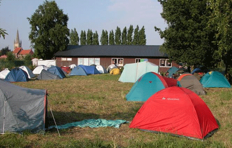 De camping van Parsipop